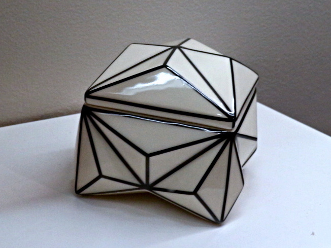 Český kubismus v Národním muzuu v Praze